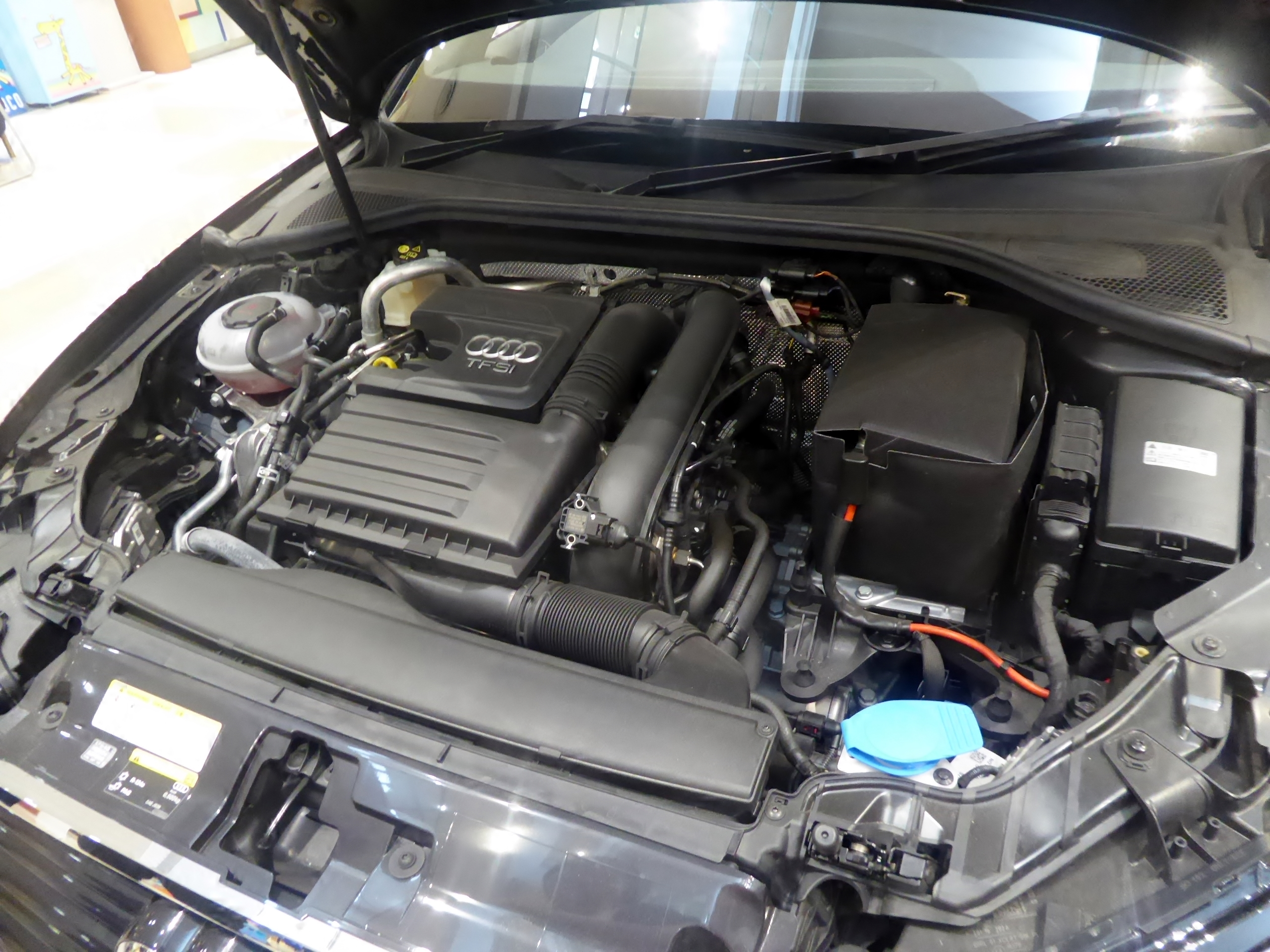 DBA-8VCXS型アウディ・A3スポーツバック30TFSI sportのエンジンルームを撮影。